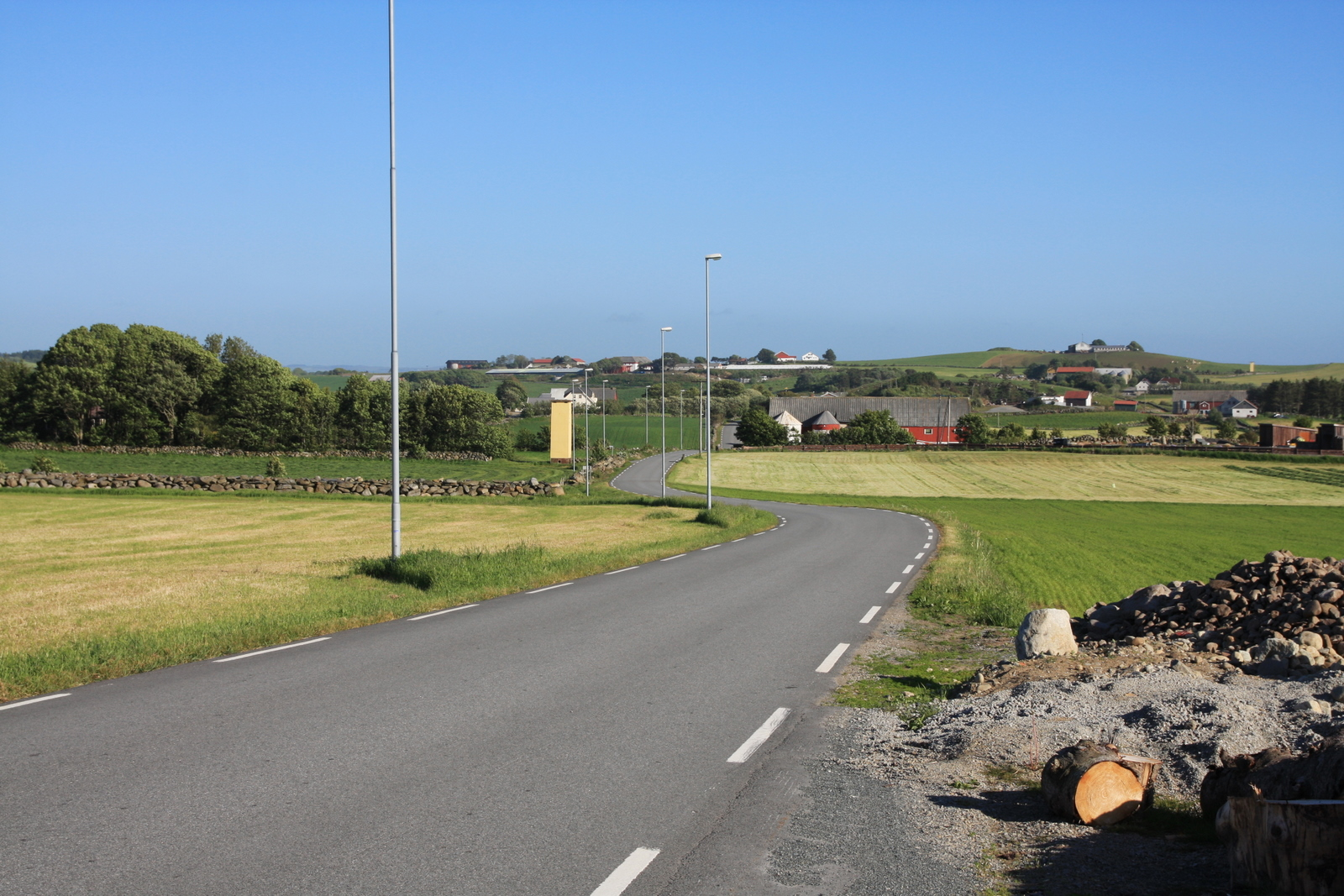 Fylkesvei 248 Boreveien